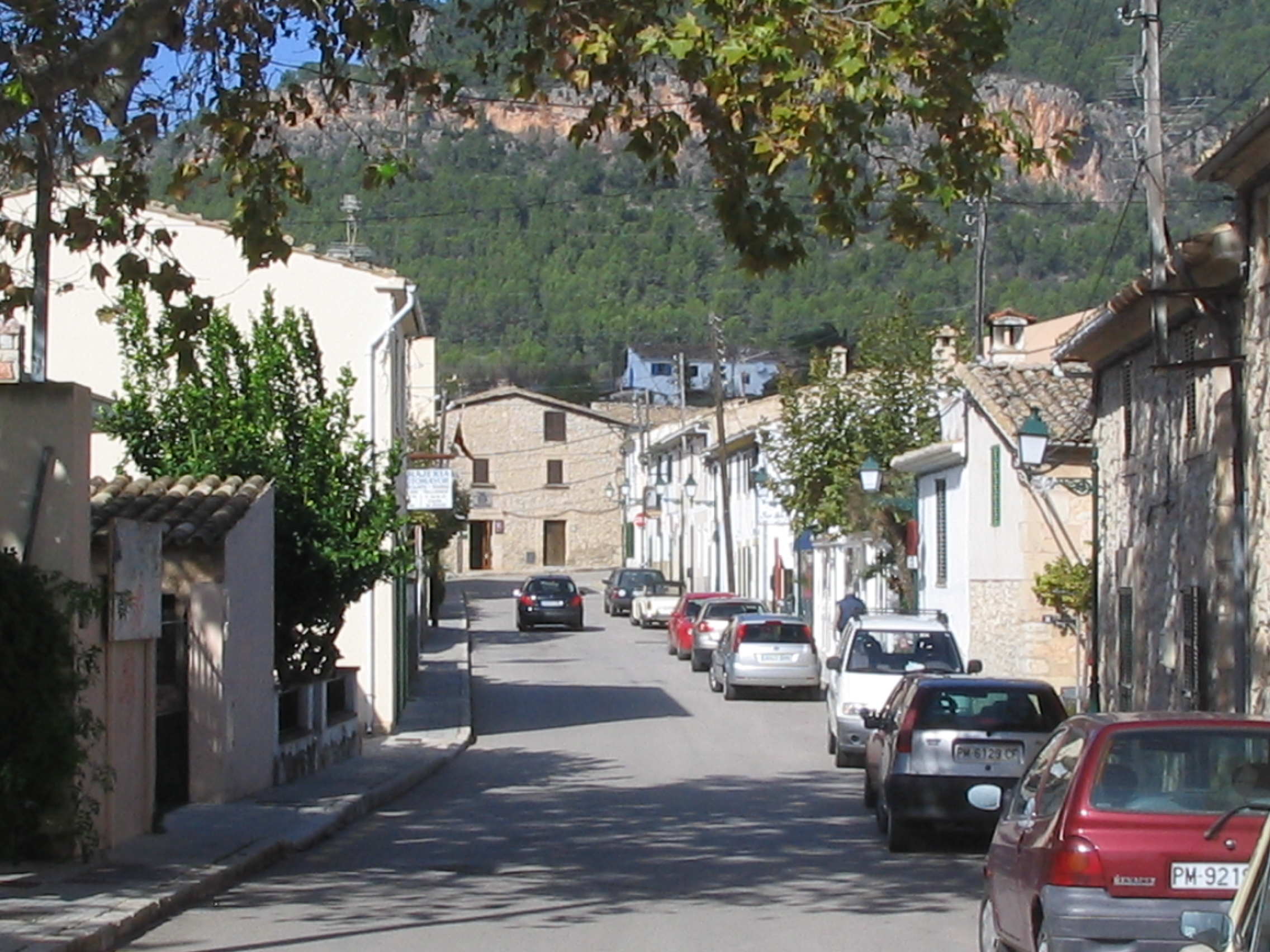 Capdellá, pueblo del término de Calviá en Mallorca.